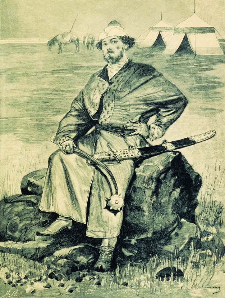 Алеша Попович. 1895. Иллюстрация к книге "Русские былинные богатыри"